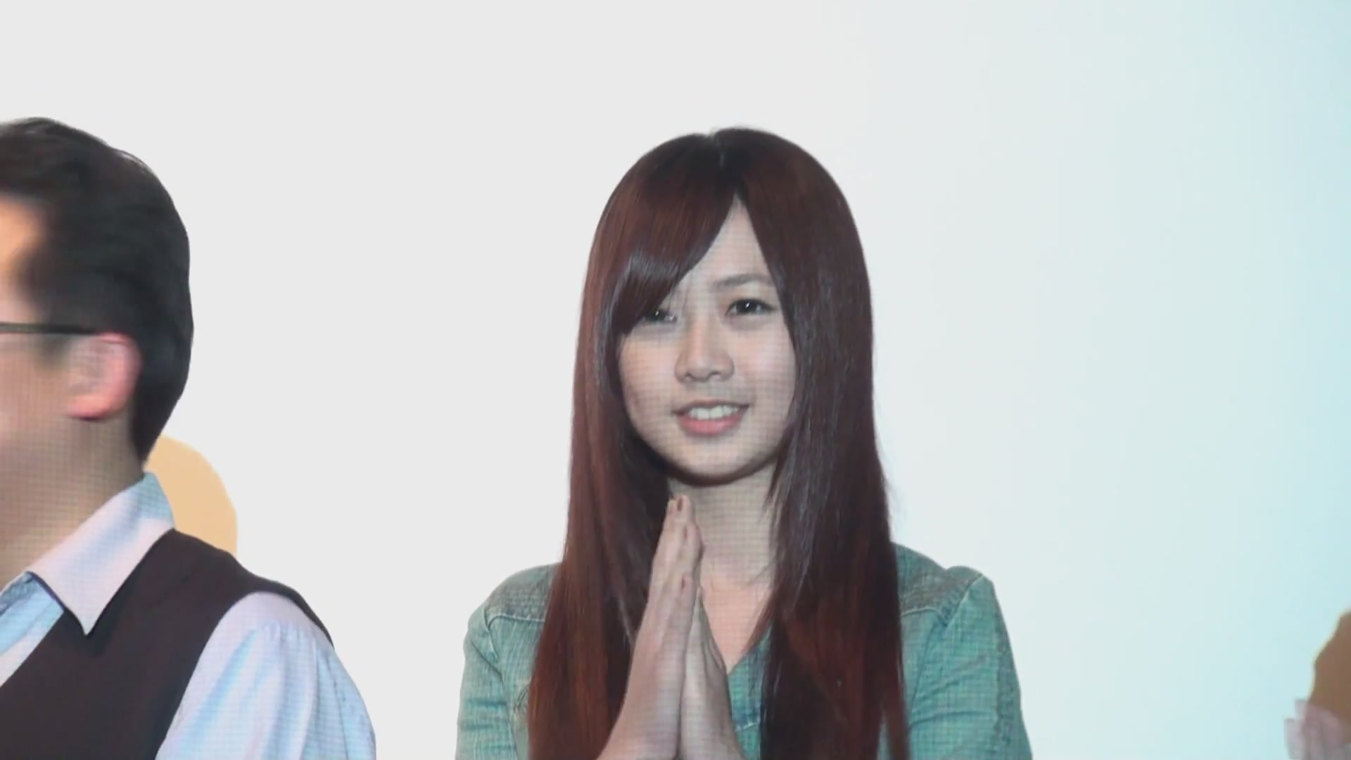 中文（台灣）: 十五影展首映記者會